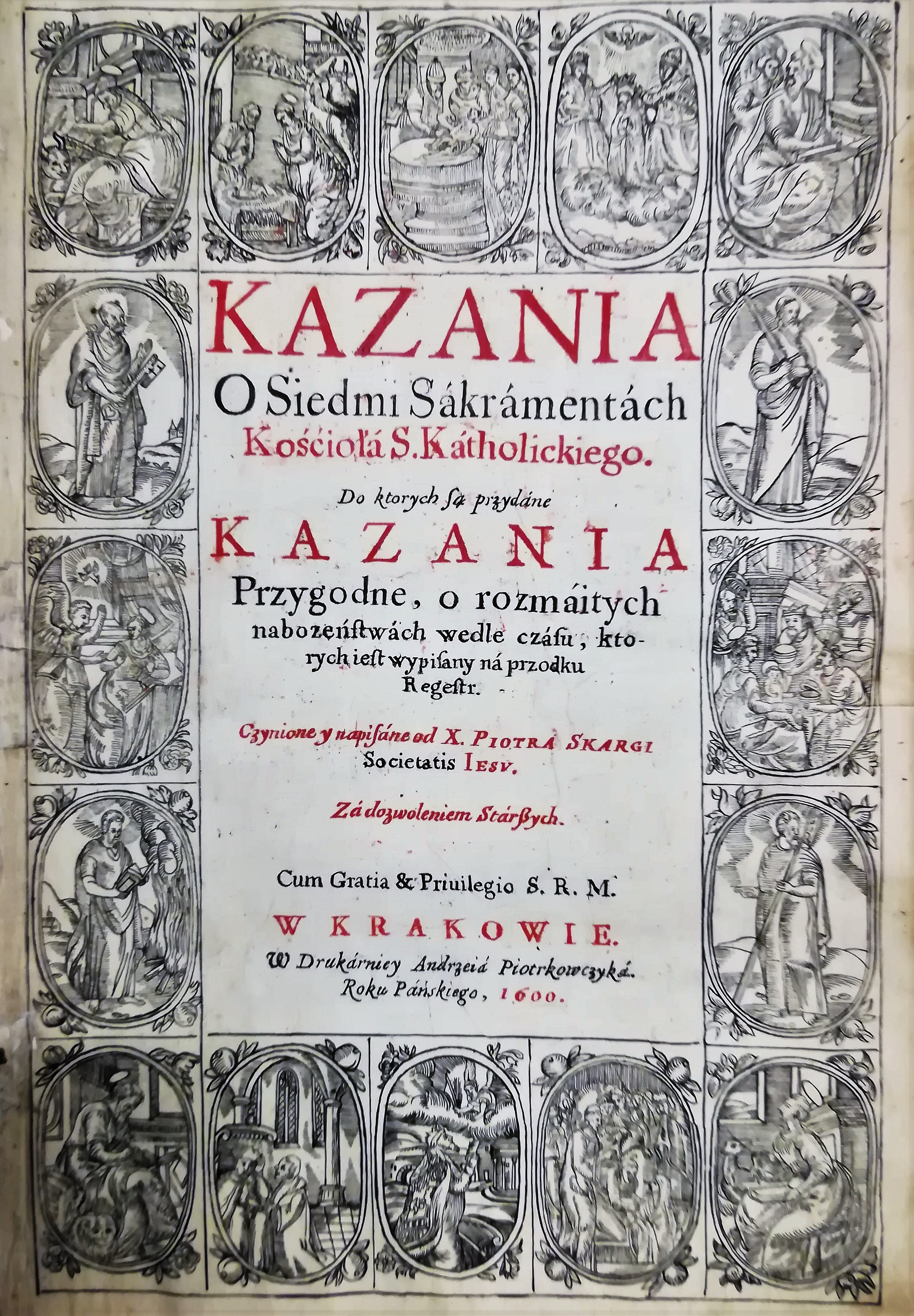 Kazania o siedmiu Sakramentach Piotra Skargi ze zb. Bibl. Raczyńskich w Poznaniu.